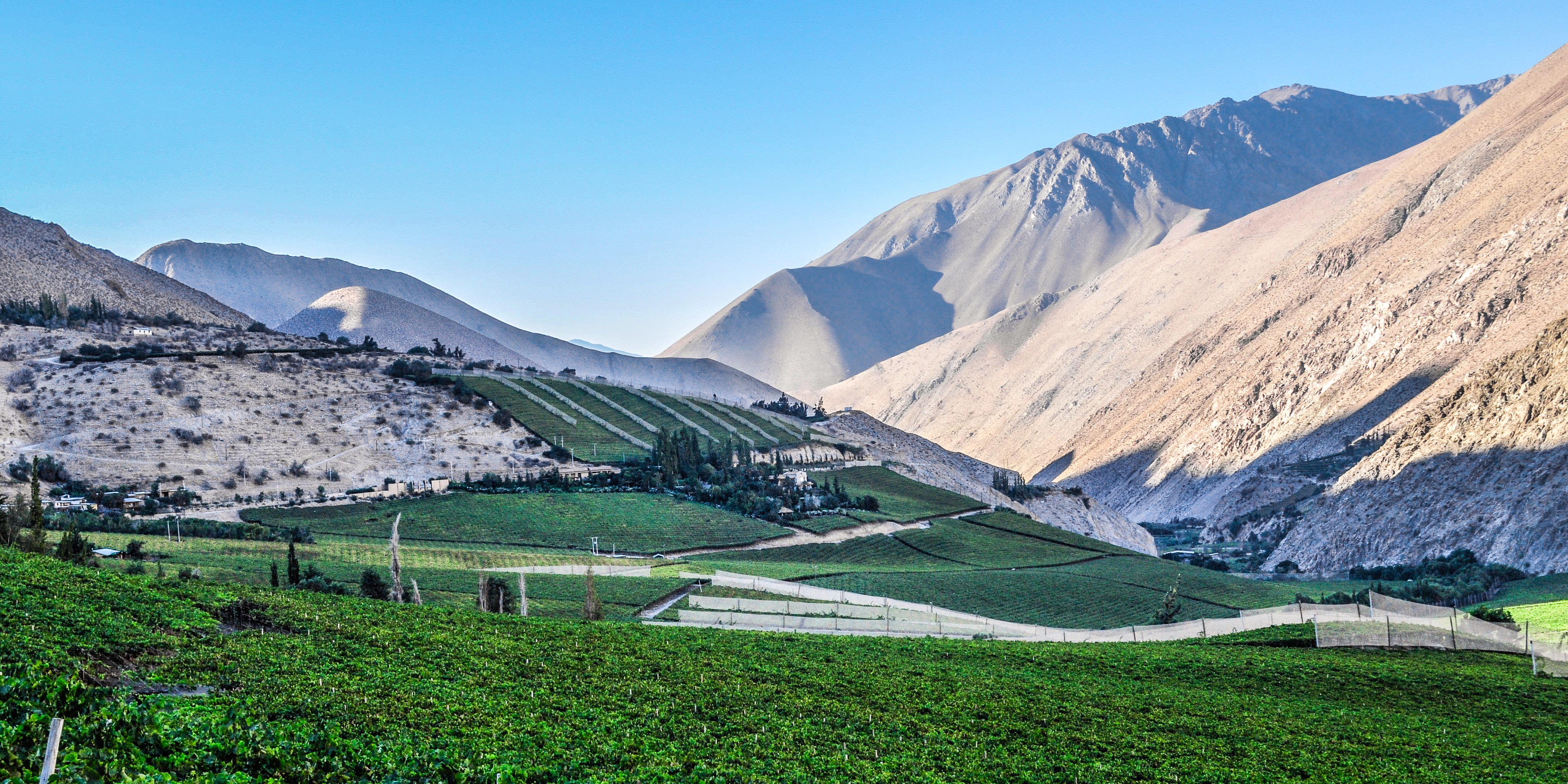 Valle del Elqui, Region de Coquimbo